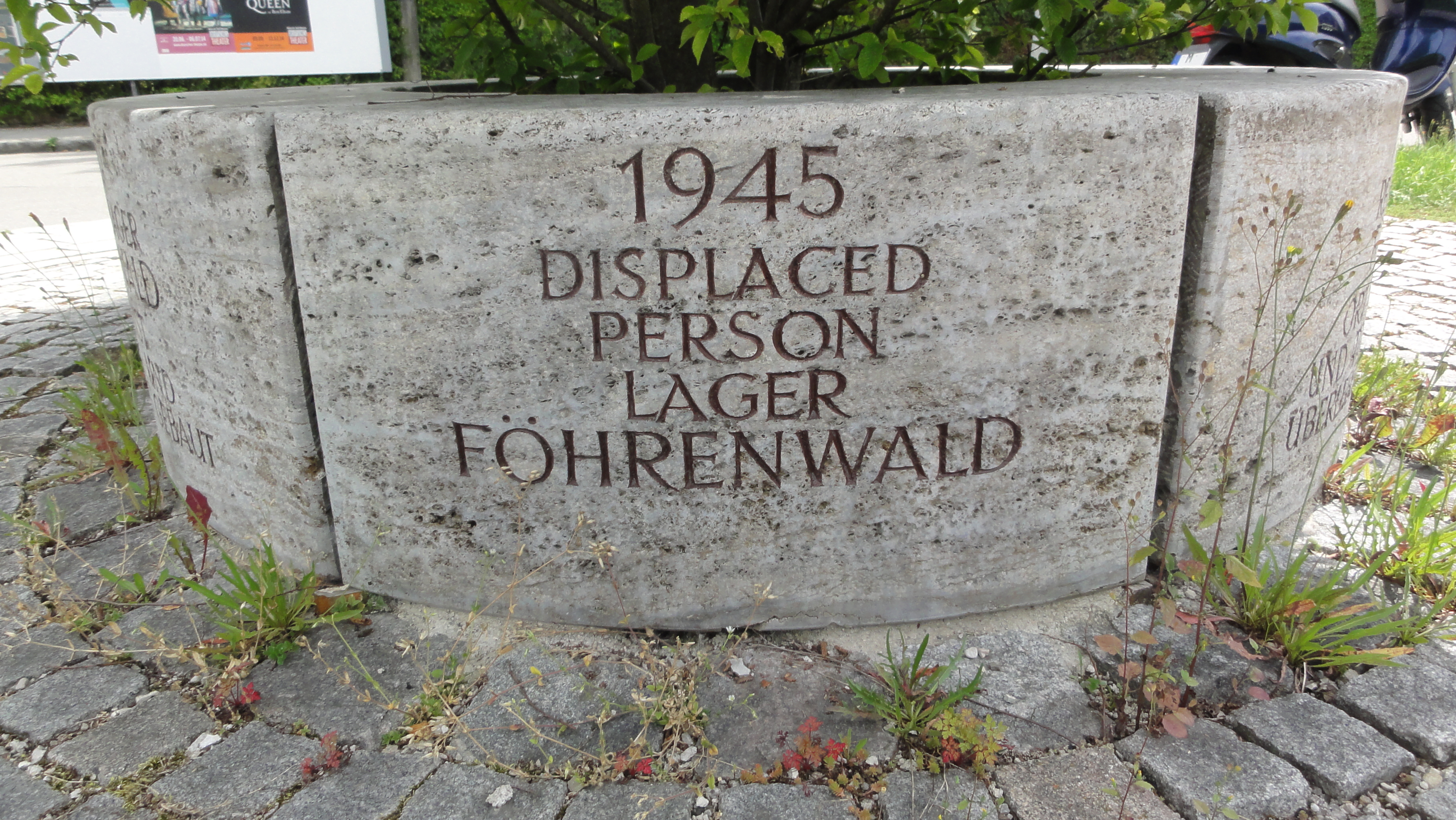 Germany — Wolfratshausen-Waldram — Prälat-Maier-Platz — kreisförmiges Denkmal, geschaffen von Ernst Grünwald 1998